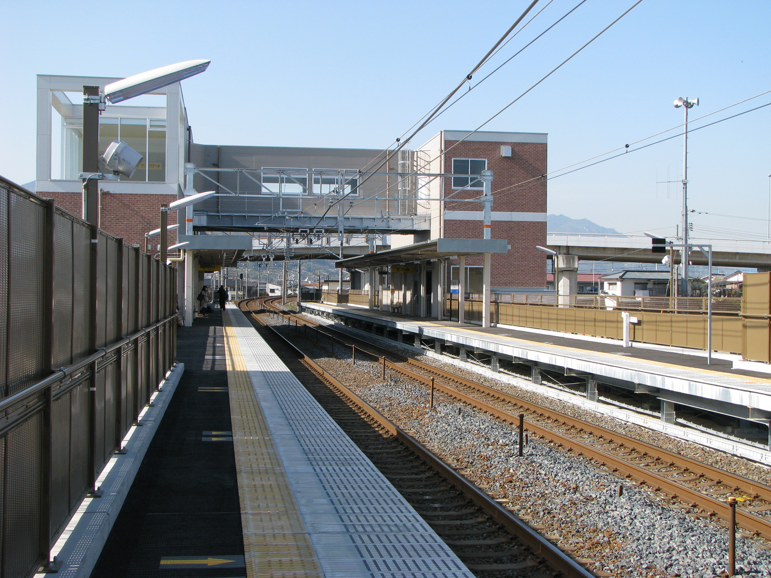 和木駅ホーム